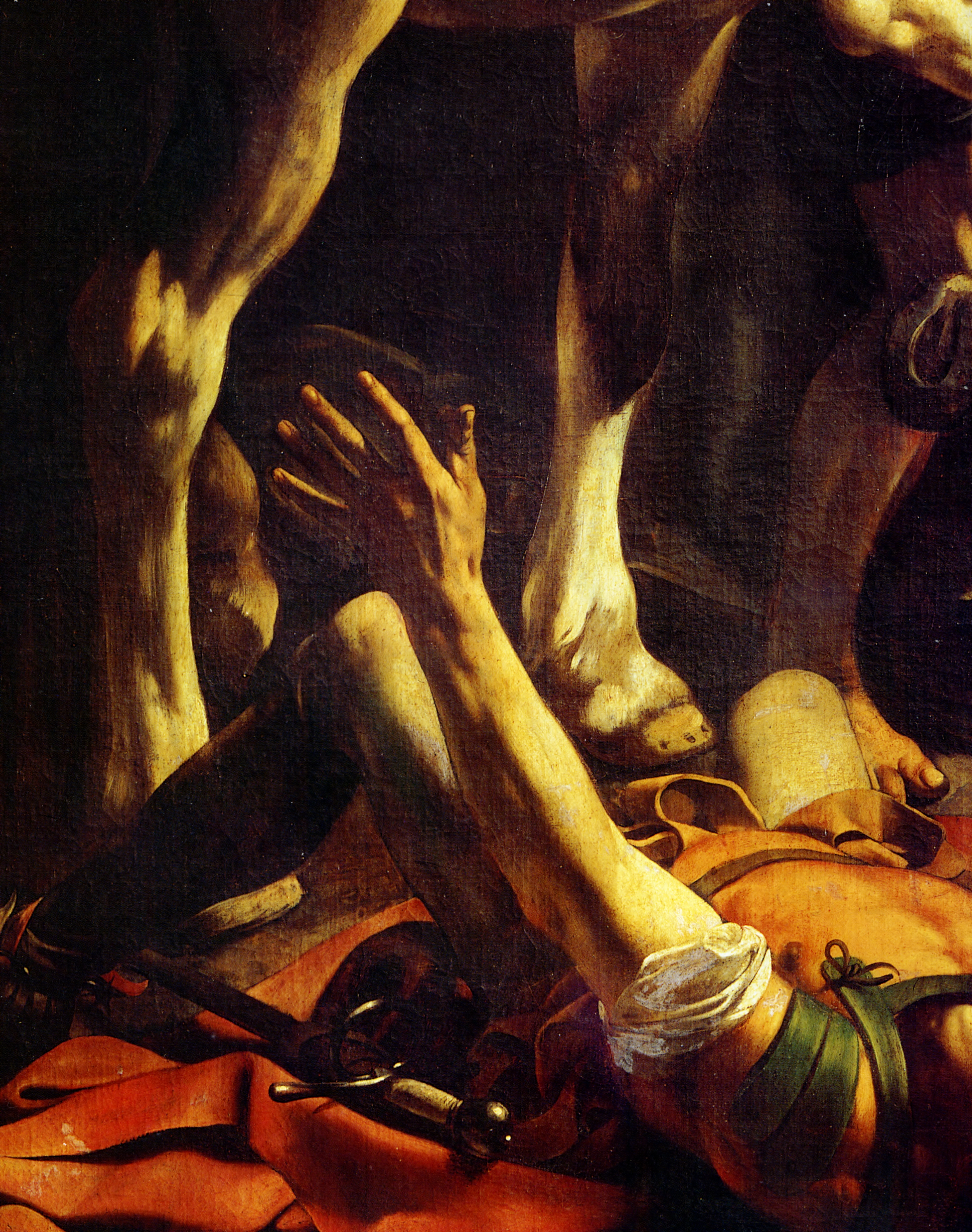 Conversione di San Paolo (ingrandimento) Caravaggio: Roma, Santa Maria del Popolo, cappella Cerasi.